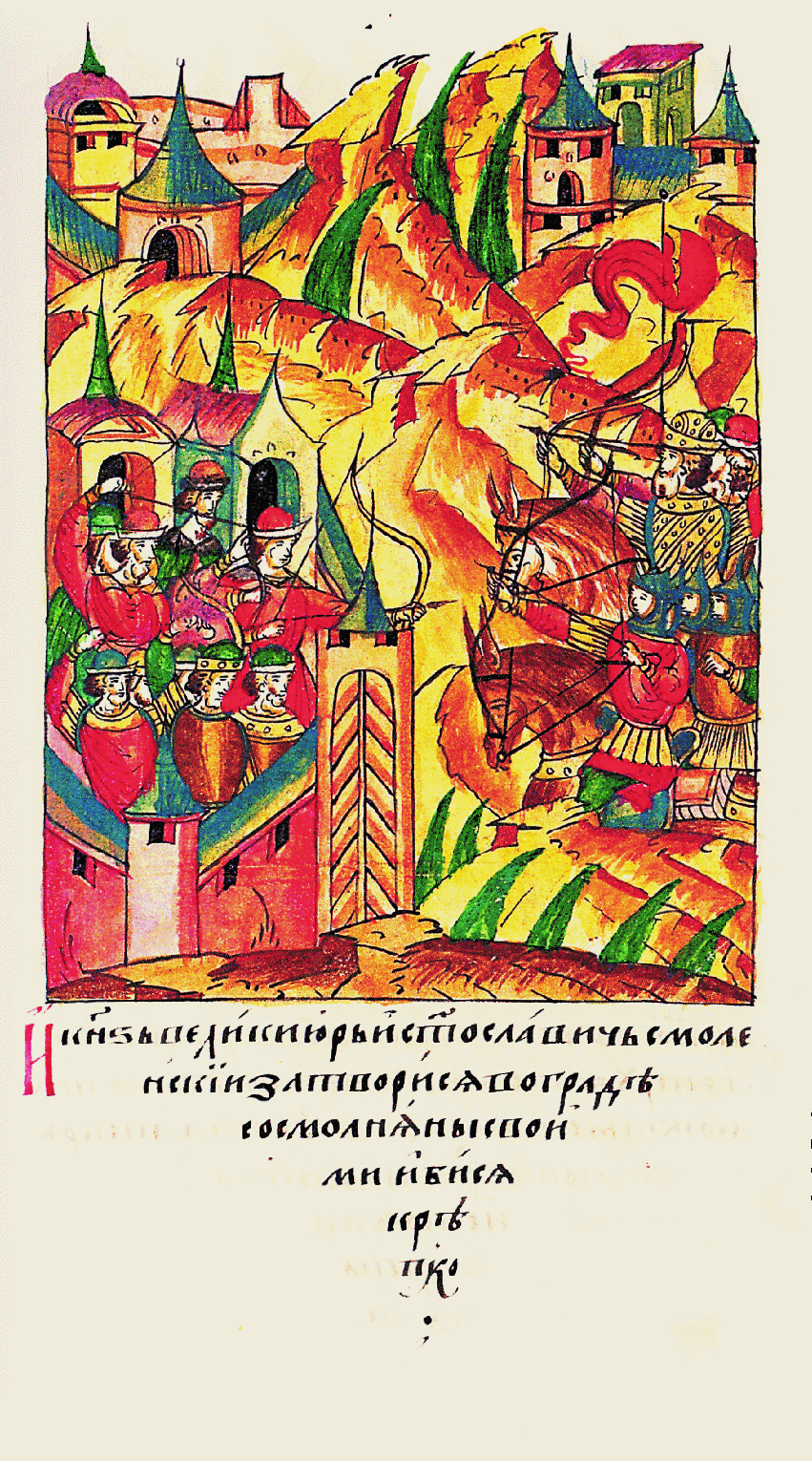 И великий князь Юрий Святославич Смоленский закрылся в городе со своими смолянами и отважно сражался.